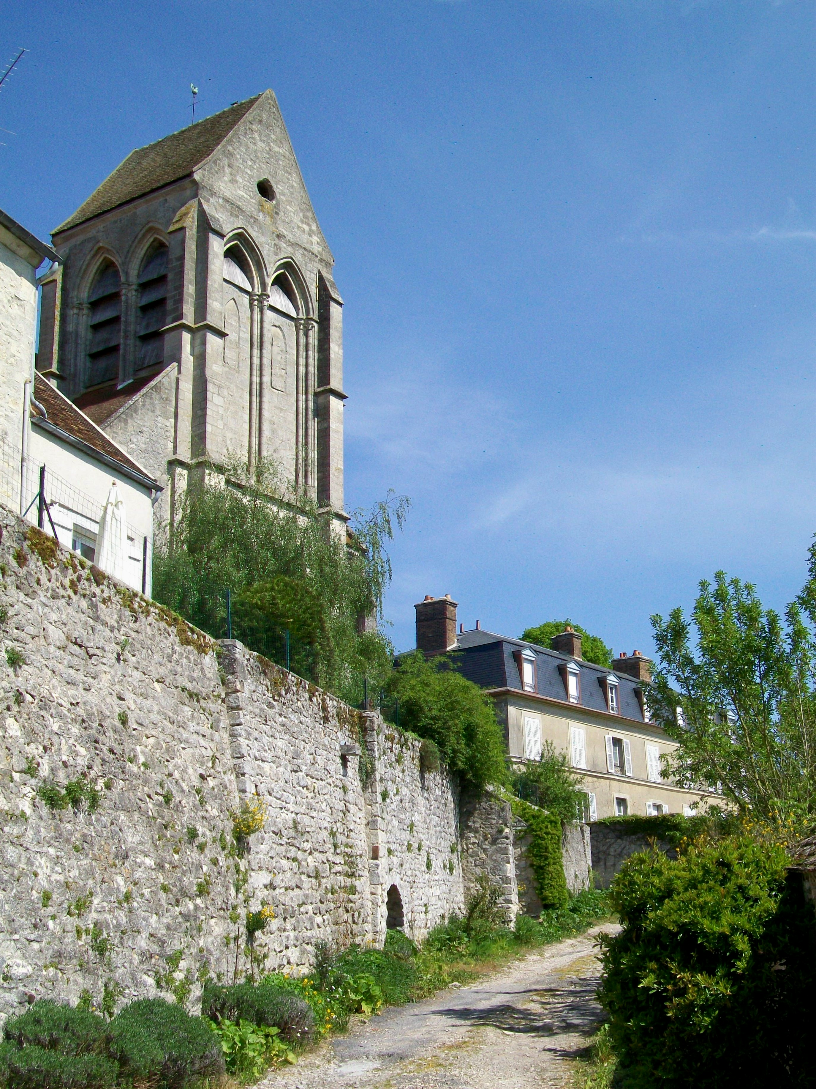 La tour de l'église Saint-Martin, et à droite, le château de la Boissière. Sans intérêt architectural, son domaine occupe tout le versant sud de la butte et la vallée de la Nonette à l'entrée du village en venant de Fontaine-Chaalis.